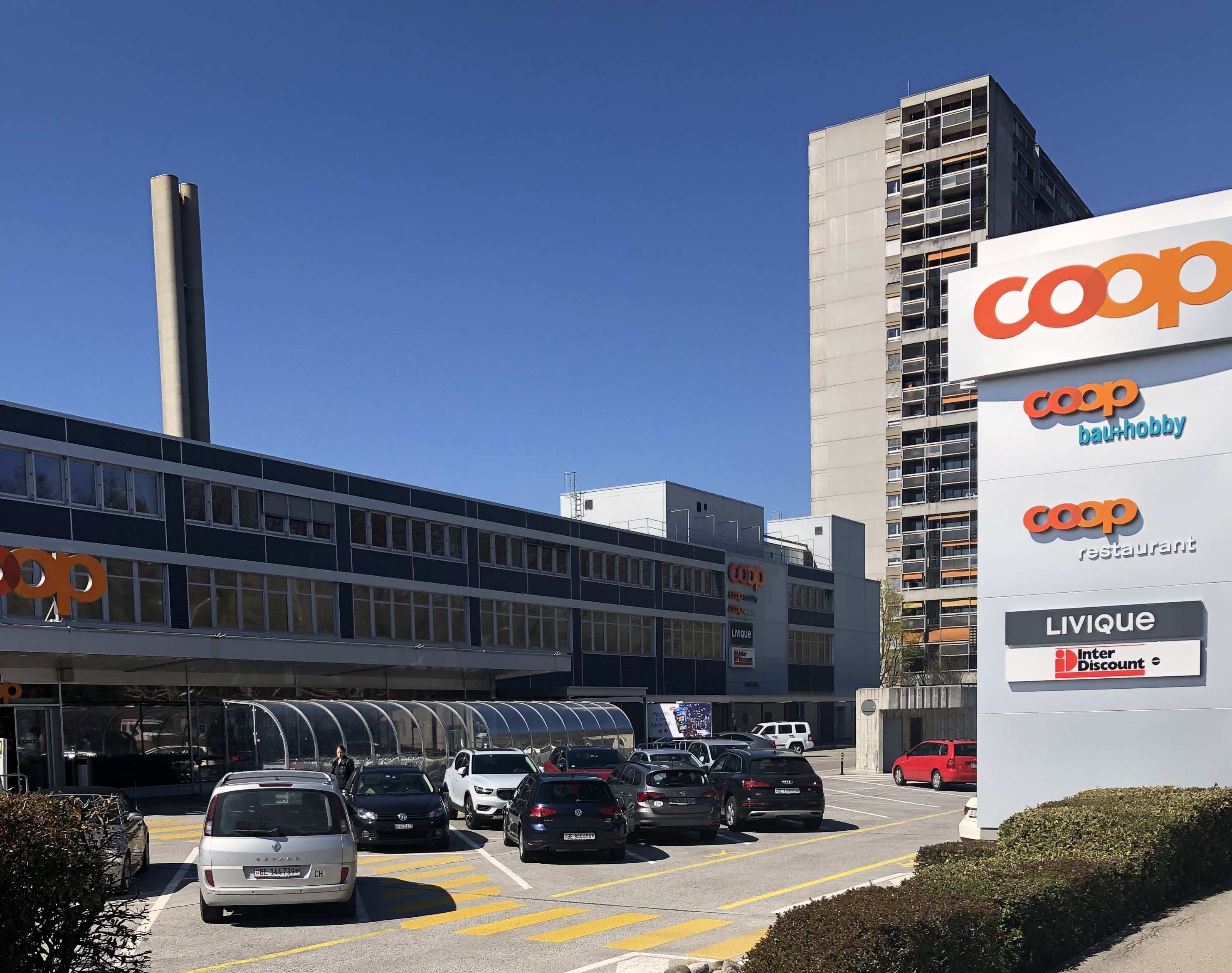 Bethlehemacker Einkaufszentrum